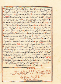 Hoca Sadettin Efendi'nin Tâcü't-Tevârih isimli eserinin orijinal el yazmasının son sayfası.